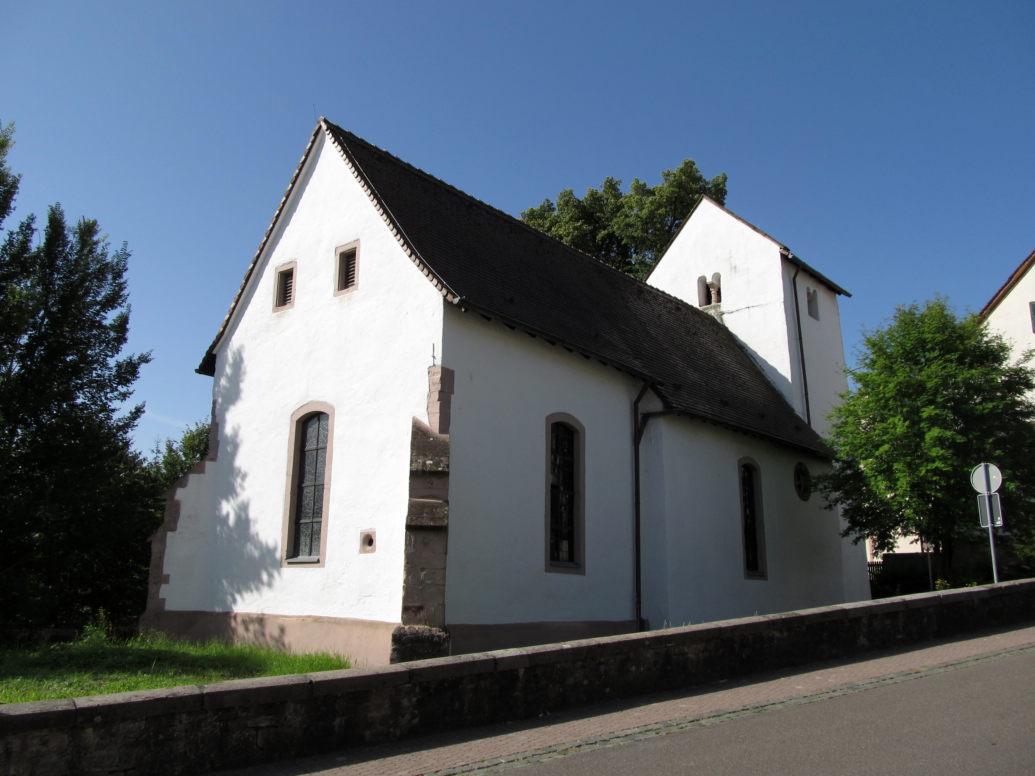 Die protestantische Kirche in Walsheim, einem Ortsteil der Gemeinde Gersheim, Saarland